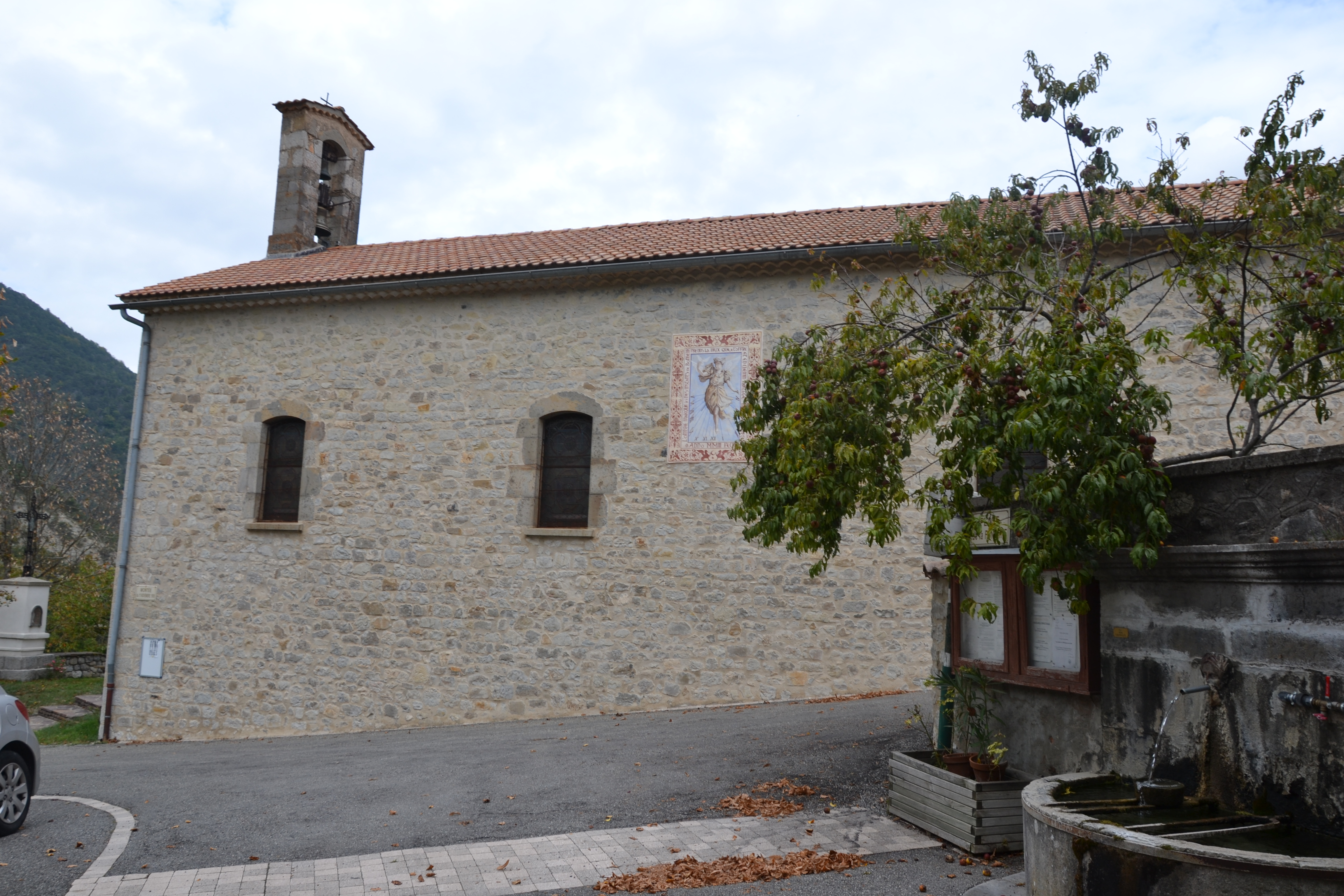 église à Chanousse